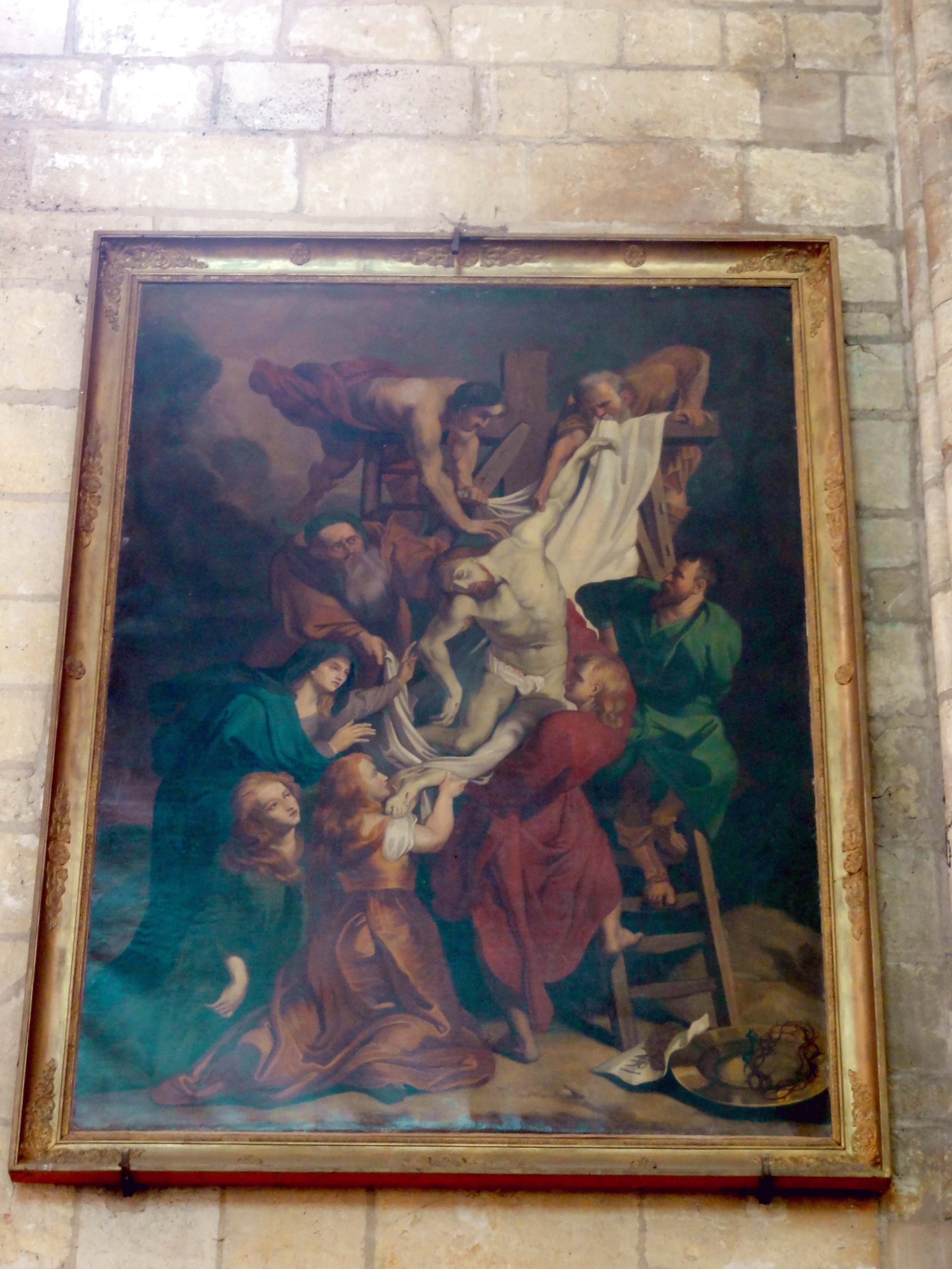 Croisillon sud, tableau - Descente de Croix.